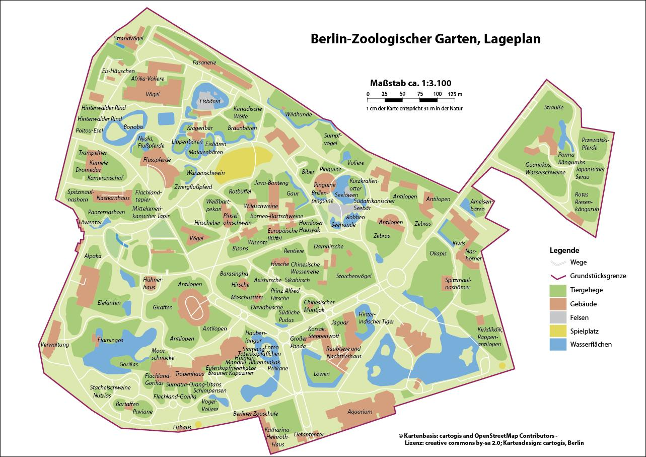 Lageplan des zoologischen Gartens Berlin